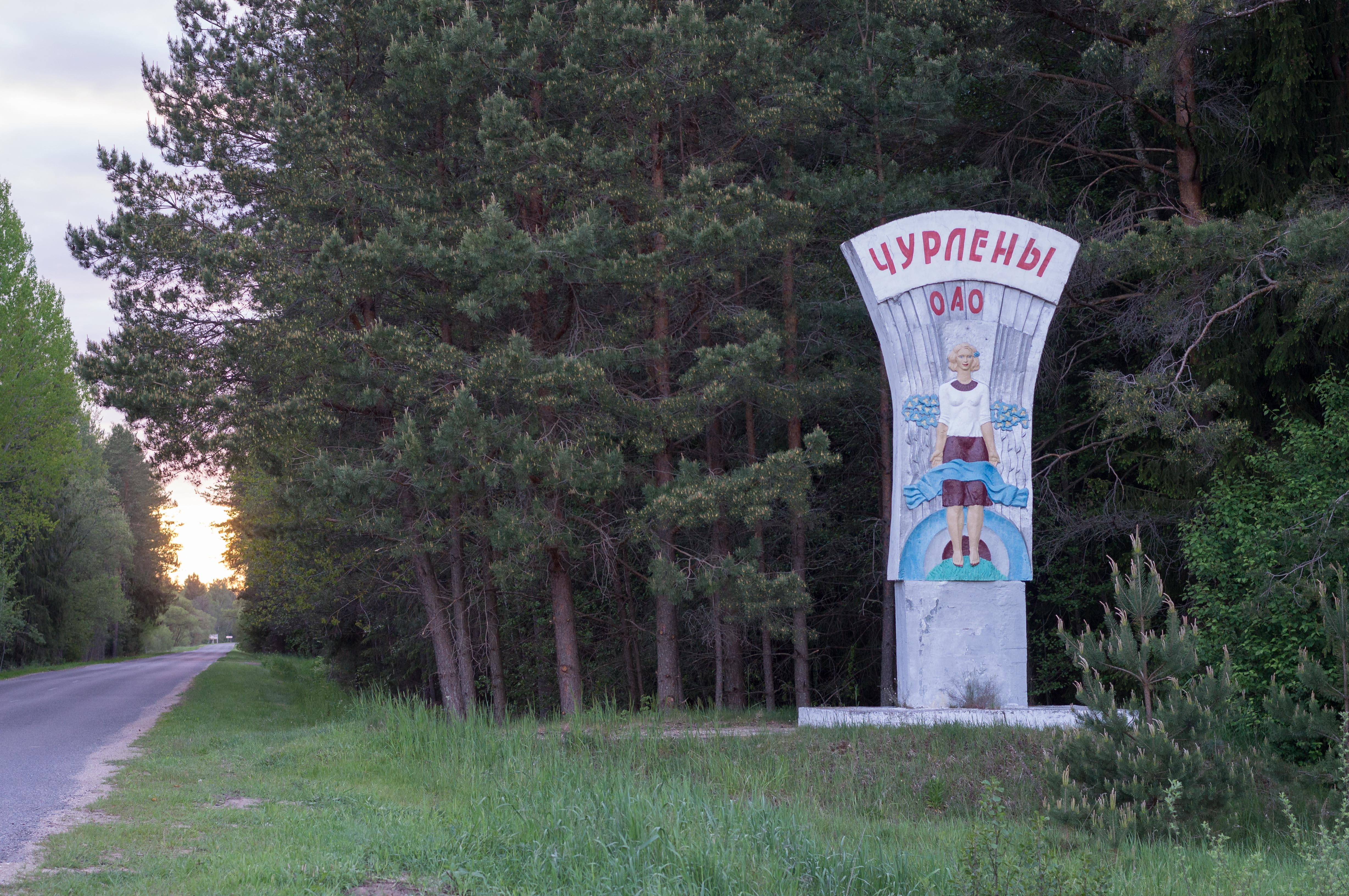 Назва "Чурлёны" засталася